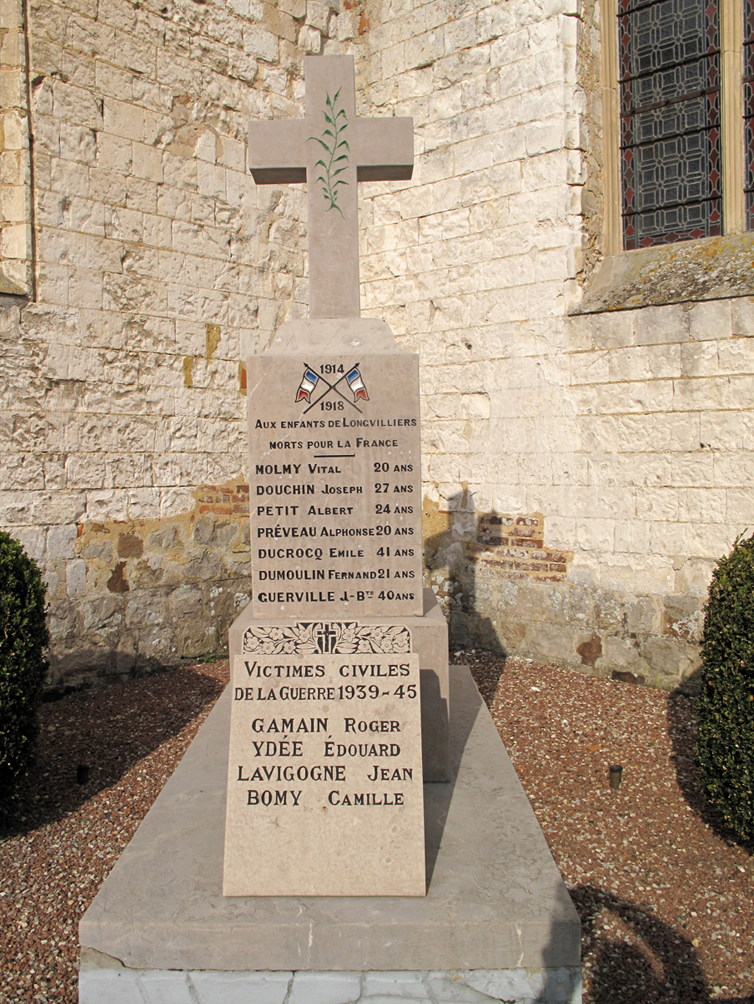 Longvilliers monument aux morts